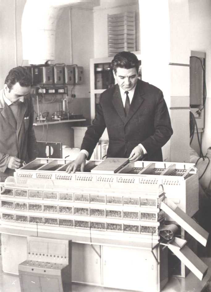 Проф. Ангел Фикиин с функционален модел на оригиналния български апарат АЗФ – една от първите три системи в света за бързо замразяване на храни чрез флуидизация, разработена в началото на 60-те години на 20-ти век (наред с LEWIS, Lewis Refrigeration Co., САЩ и FLoFREEZE, FRIGOSCANDIA, Швеция).